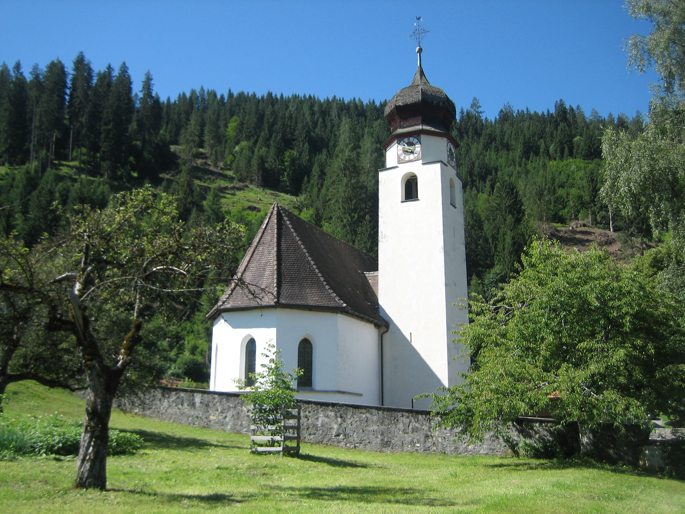 Fideris GR